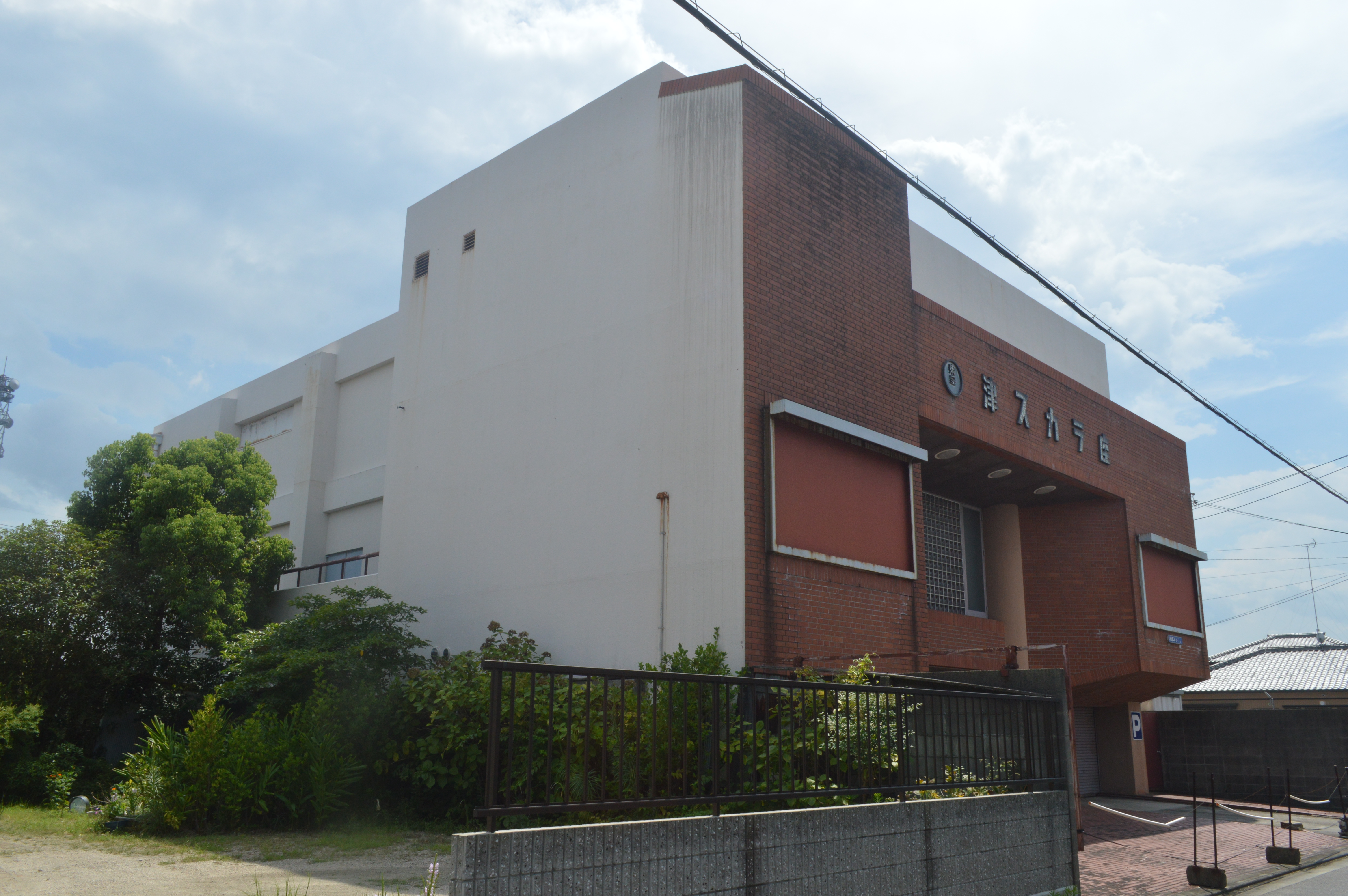 三重県津市にあった映画館「津スカラ座」。2001年閉館。